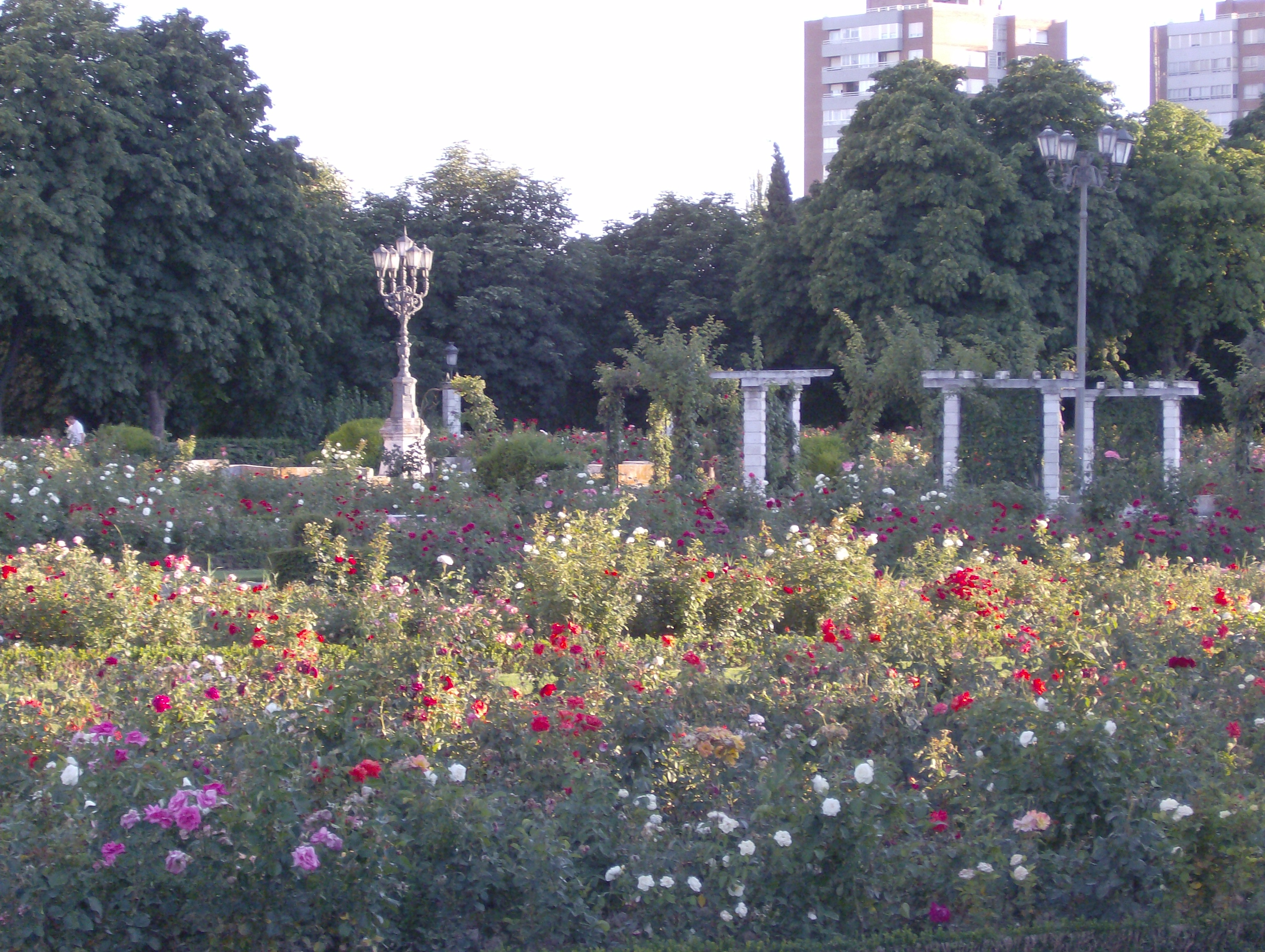 Rosaleda Francisco Sabadell (Valladolid)